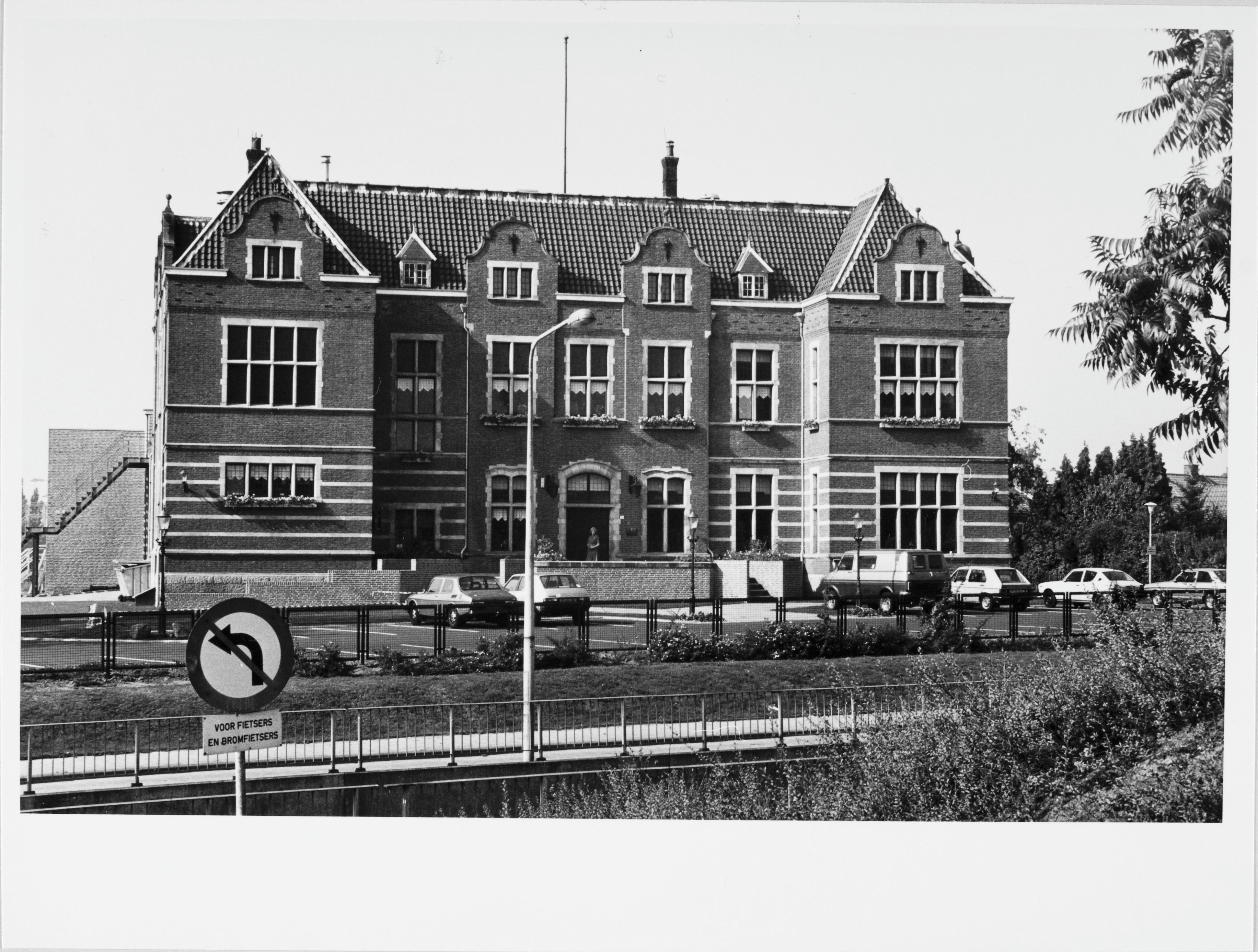 Voormalig kantoor Gelderman: Overzicht van de voorgevel (opmerking: Afdrukken verkregen via Ypie Attema, oud medewerkster van de Rijksdienst voor de Monumentenzorg.)